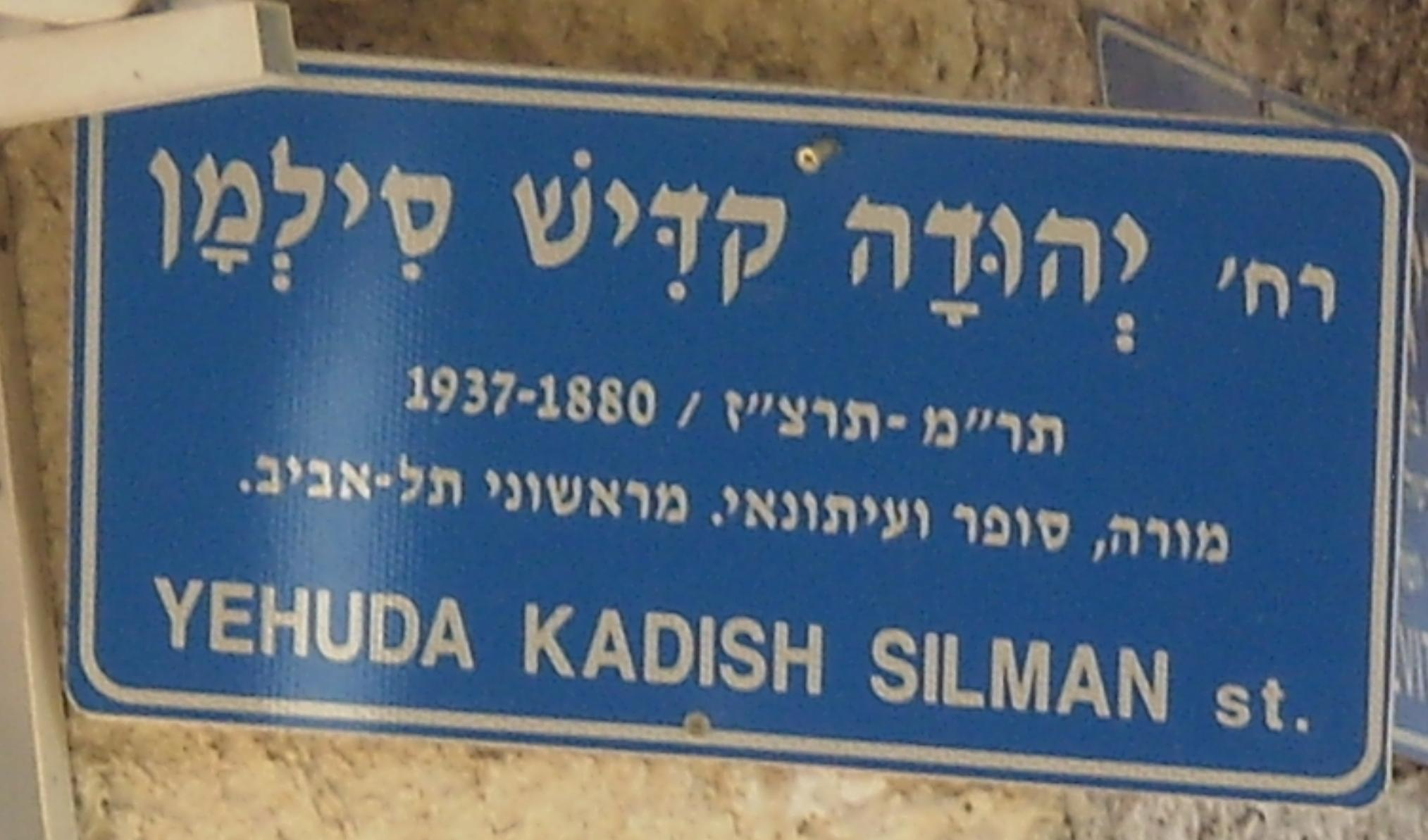 רחוב יהודה קדיש סילמן בתל אביב.